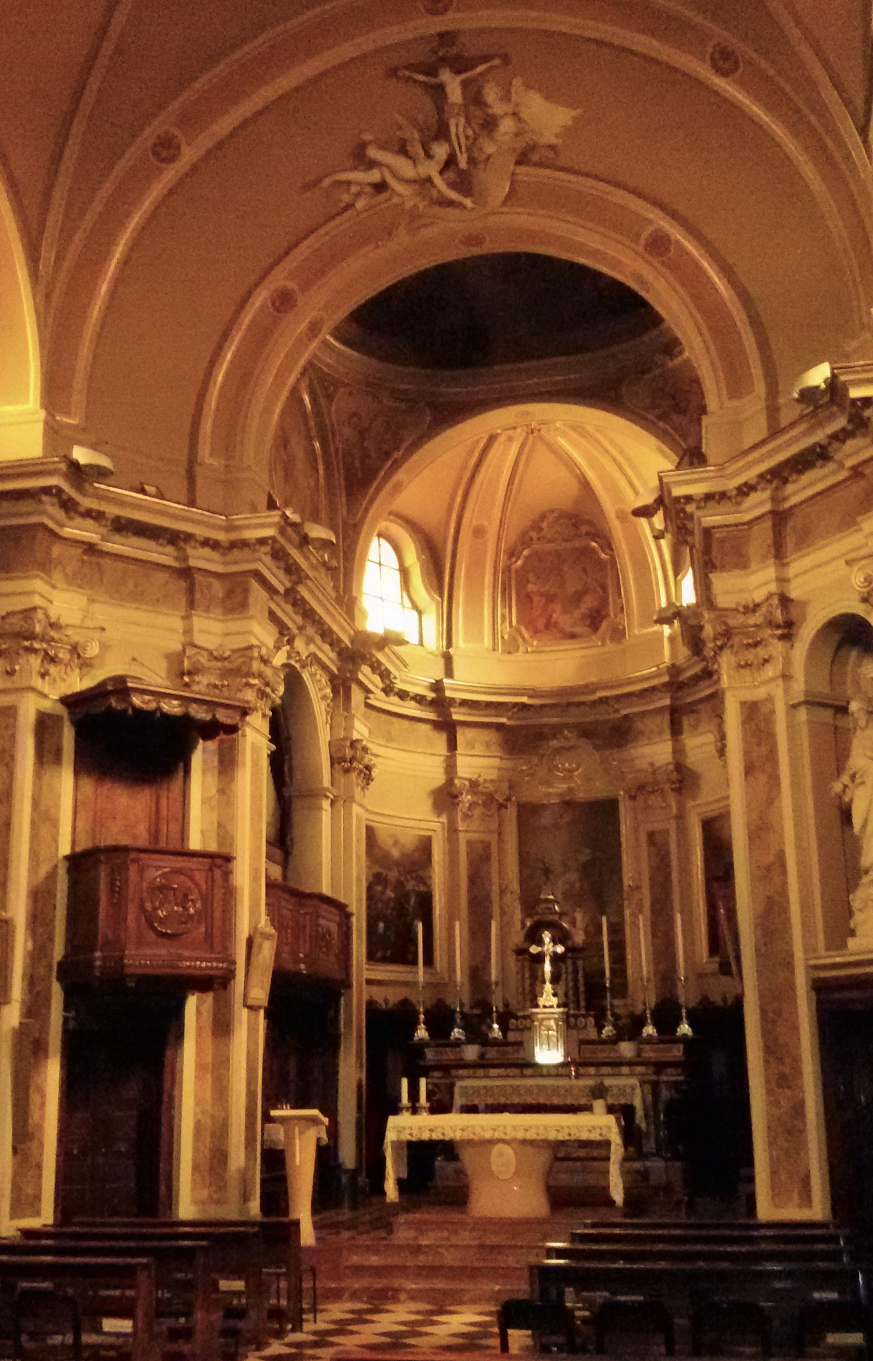 Interno Chiesa parrocchiale Santi Gervasio e Protasio Vercurago